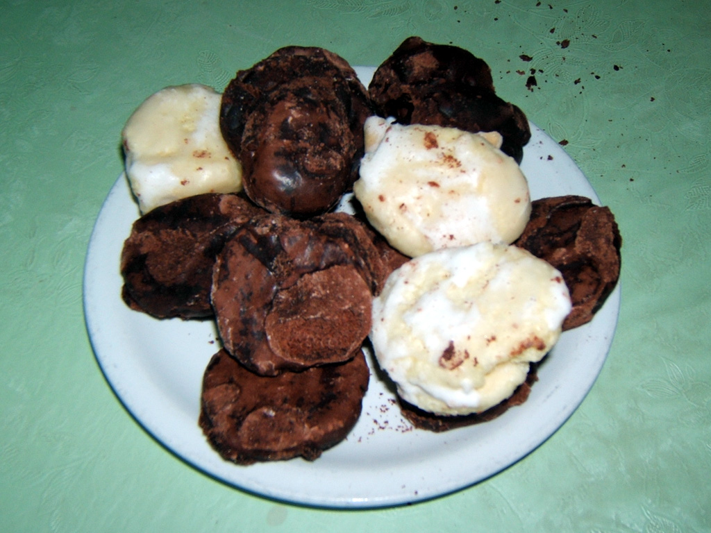 dalle mie parti si chiamano mustazzueli (mostaccioli salentini).. altri termini Mustazzoli o Scaiozzi o Mustaccioli o Mostaccioli foto by me